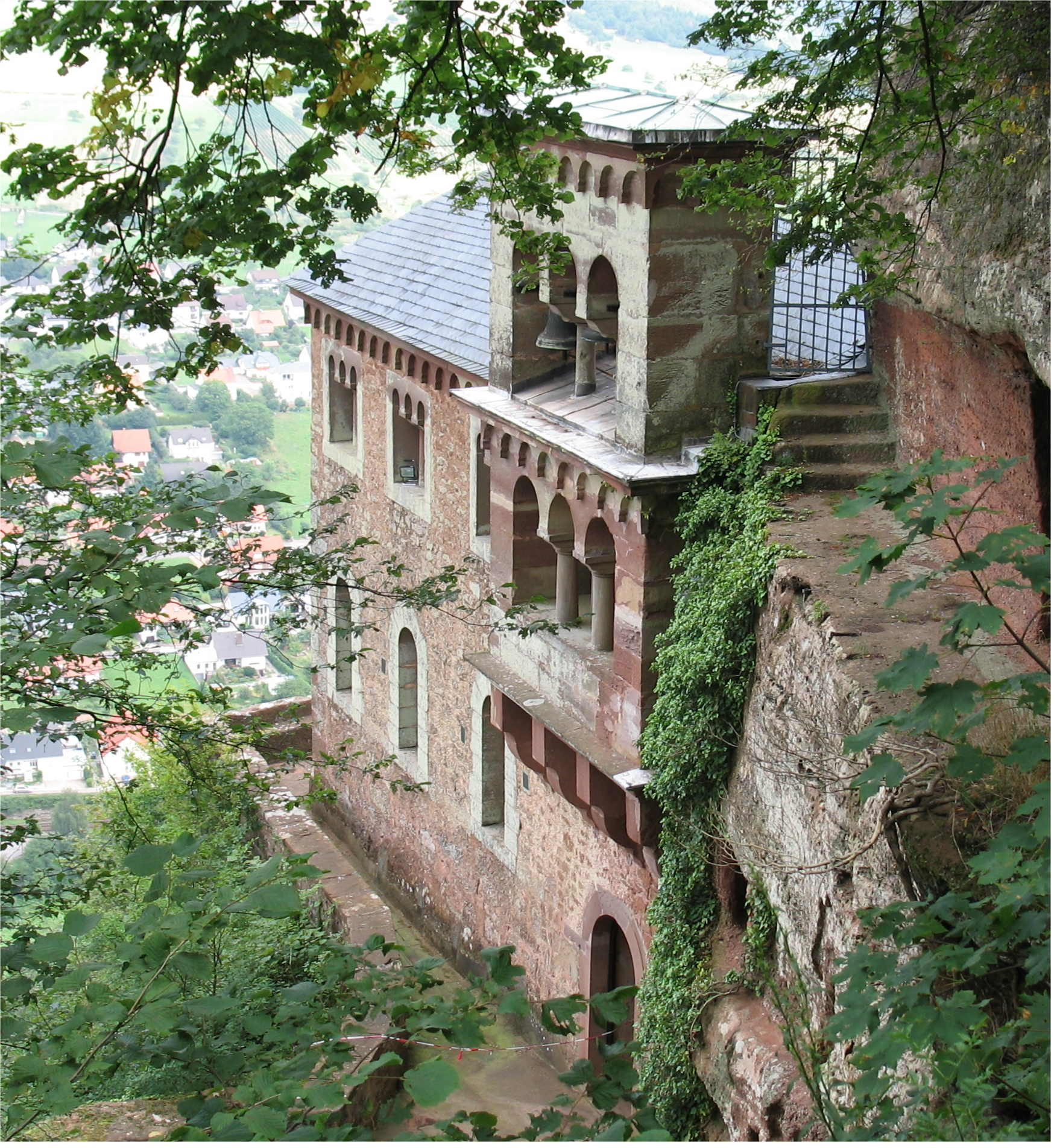 D'Grafkapell op der Klaus zu Kastel-Staadt.